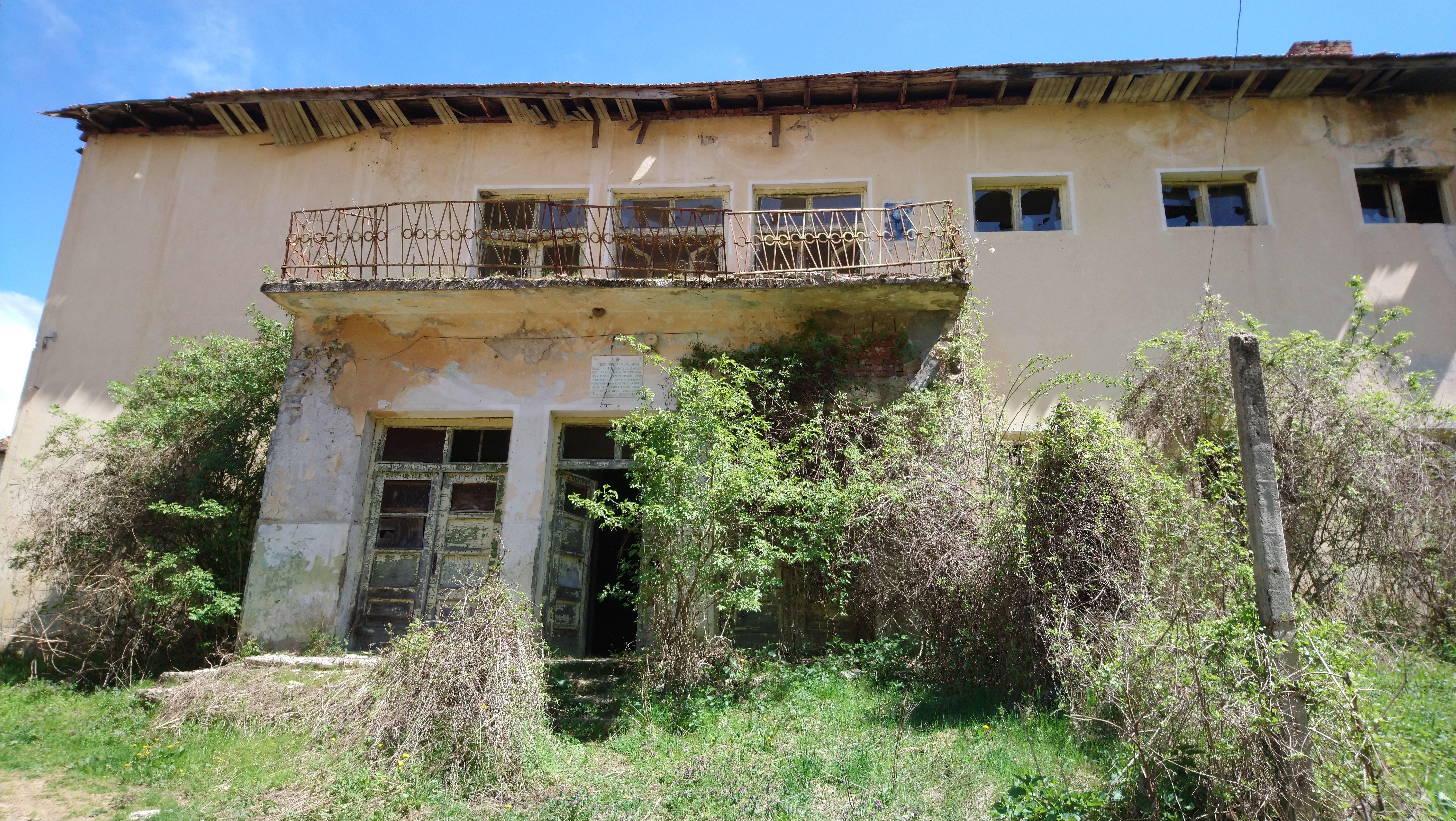 Някогашното училище в село Голешово, с паметна плоча на Стойо Хаджиев